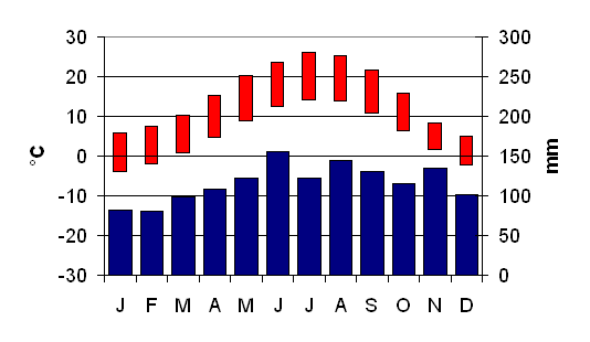 Climate diagram Ljubljana Slovenia Podnebni diagram za Ljubljano, Slovenija